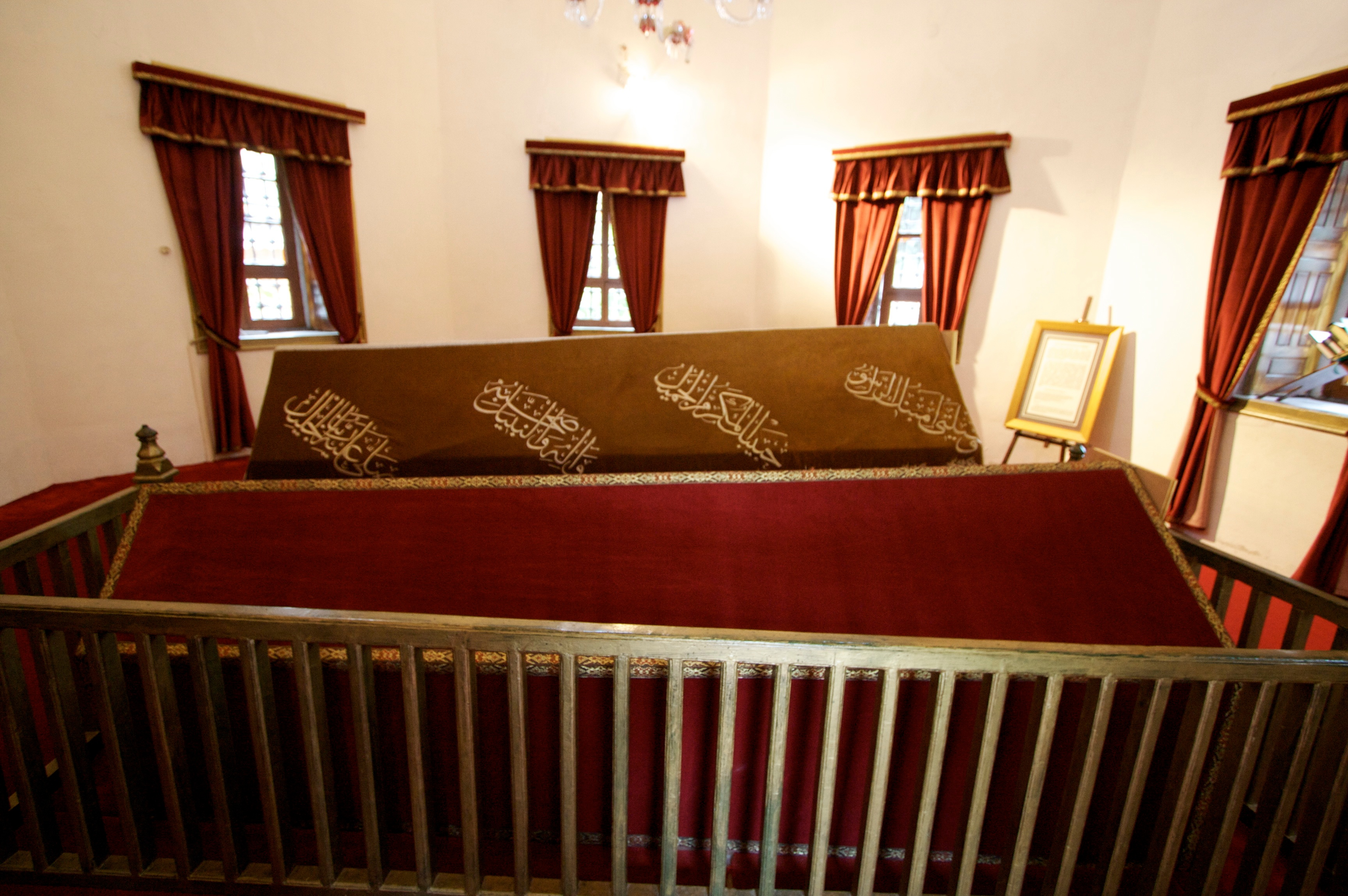 İstanbul Fatih Camii'nde bulunan Gülbahar Hatun Türbesi